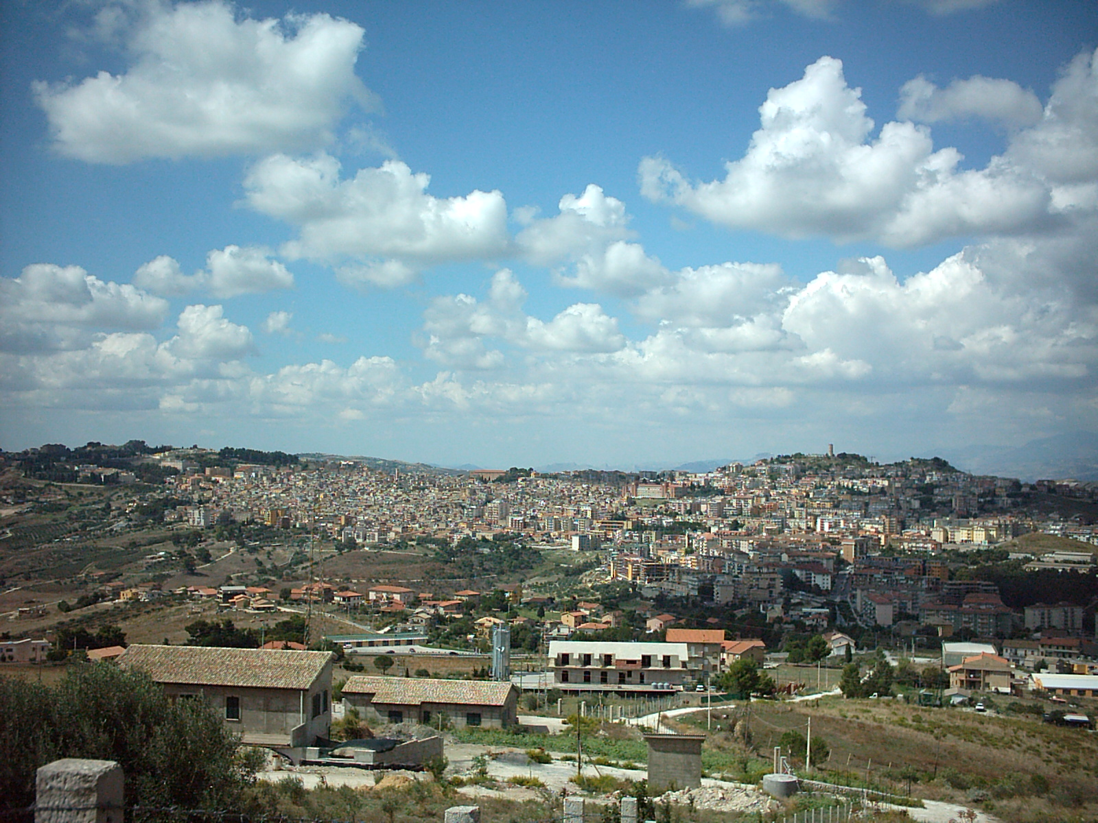 Panorama Città di San Cataldo(CL)